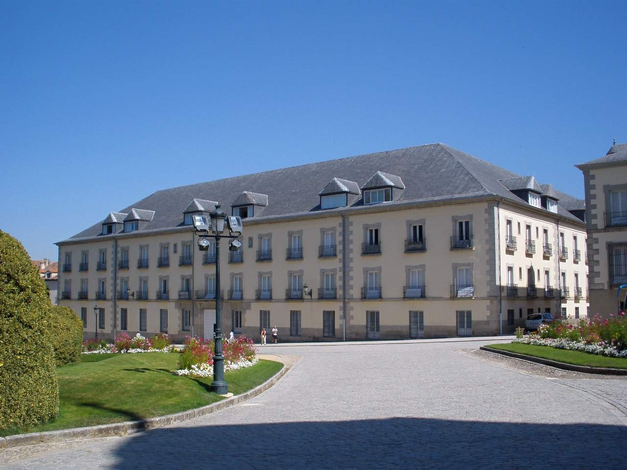 Palacio Real de la Granja-Casa de Canónigos (San Ildefonso)